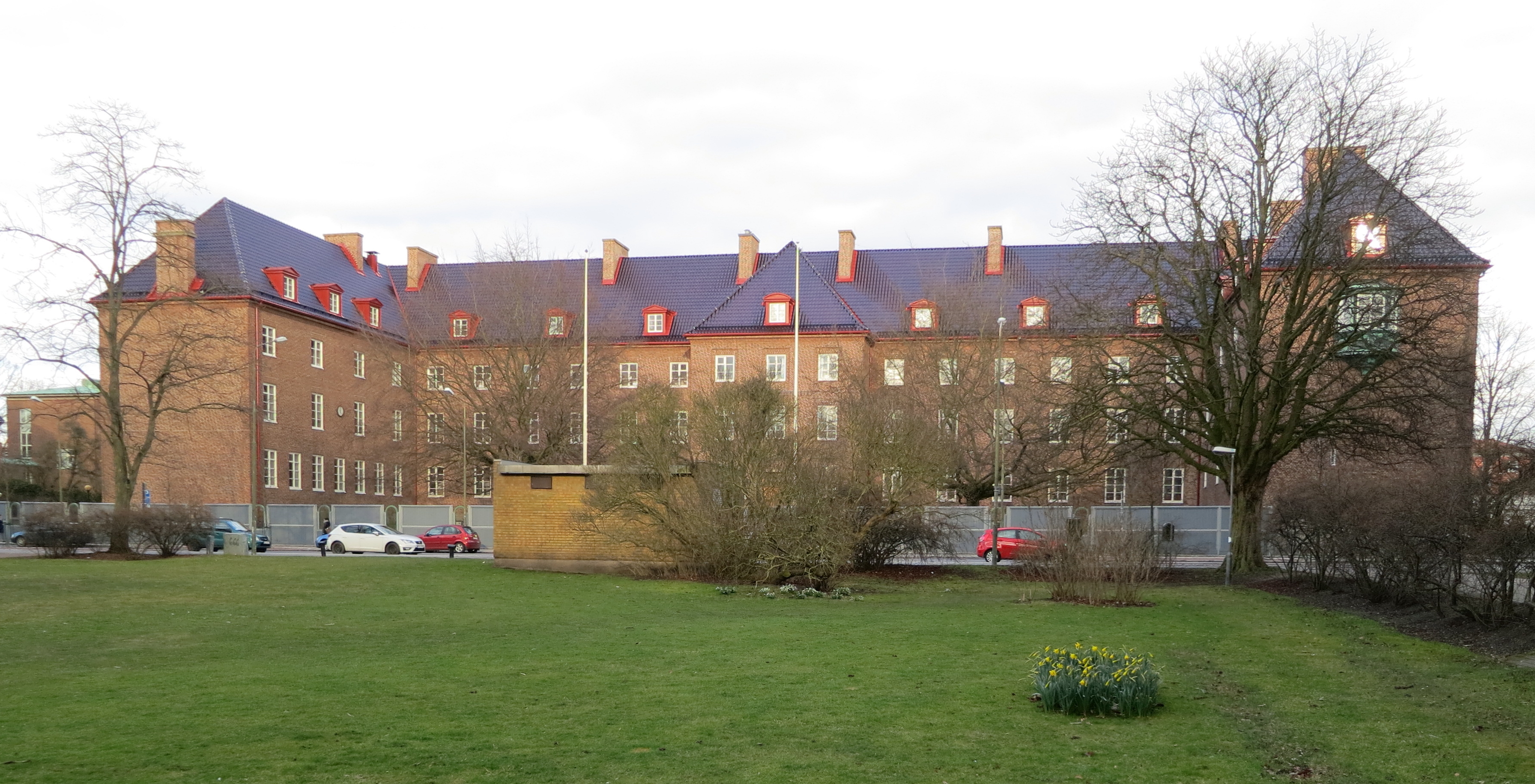 Pildammsskolan, mars 2016